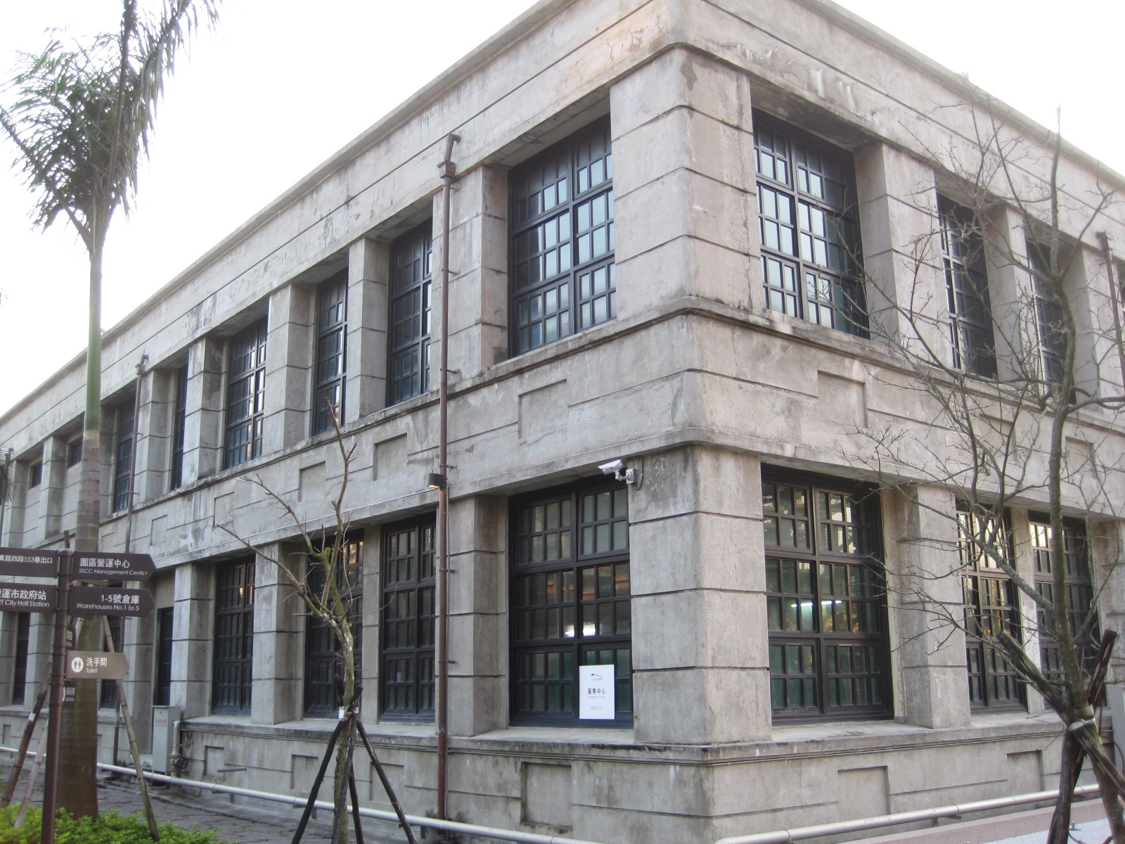 中文（台灣）: 松山菸廠廠房。